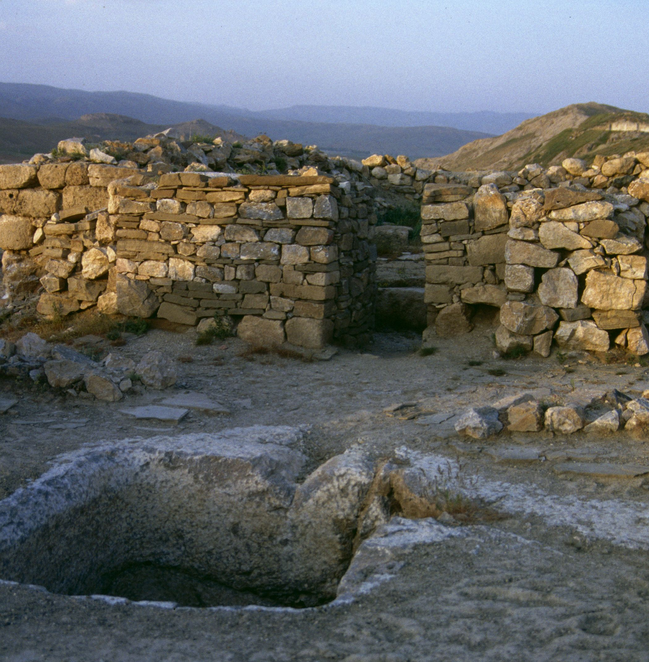 Çavuştepe: Zisternen im Palast